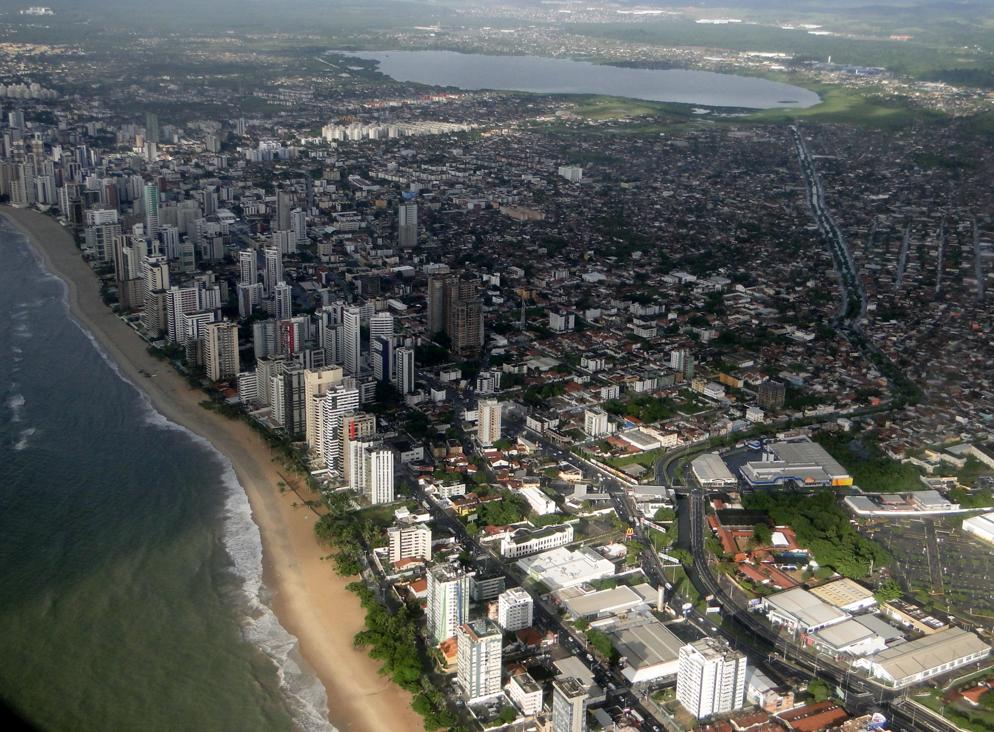 Jaboatão